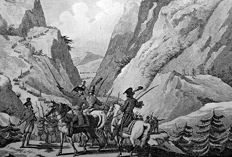 Antoine Digonet (1763-1811)